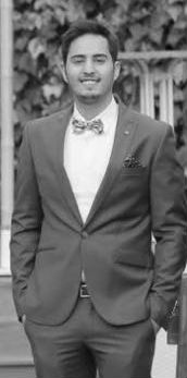 נאור סינואני 2016 מתוך אירוע פרטי